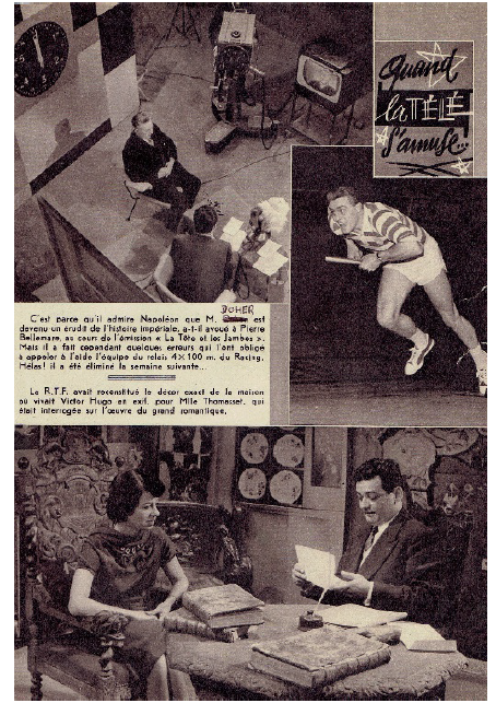 Participation de Jacques Dohen à l'emmision "La tête les jambes"